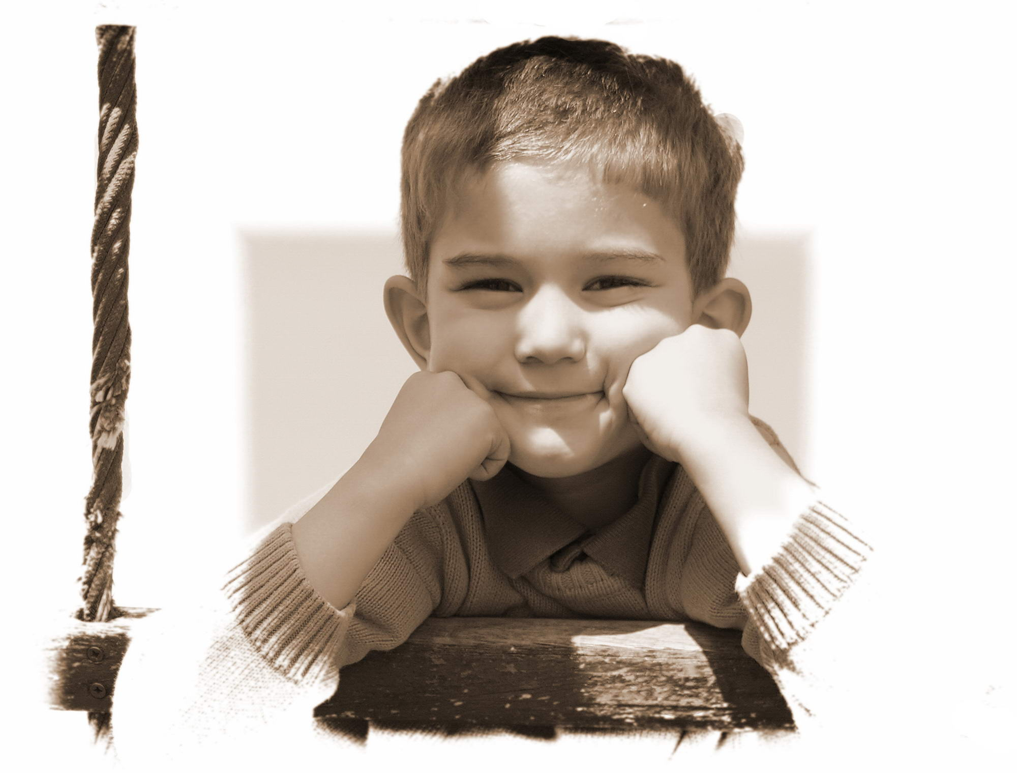 Galicia Publish by= Luis Miguel Bugallo Sánchez. Self made.